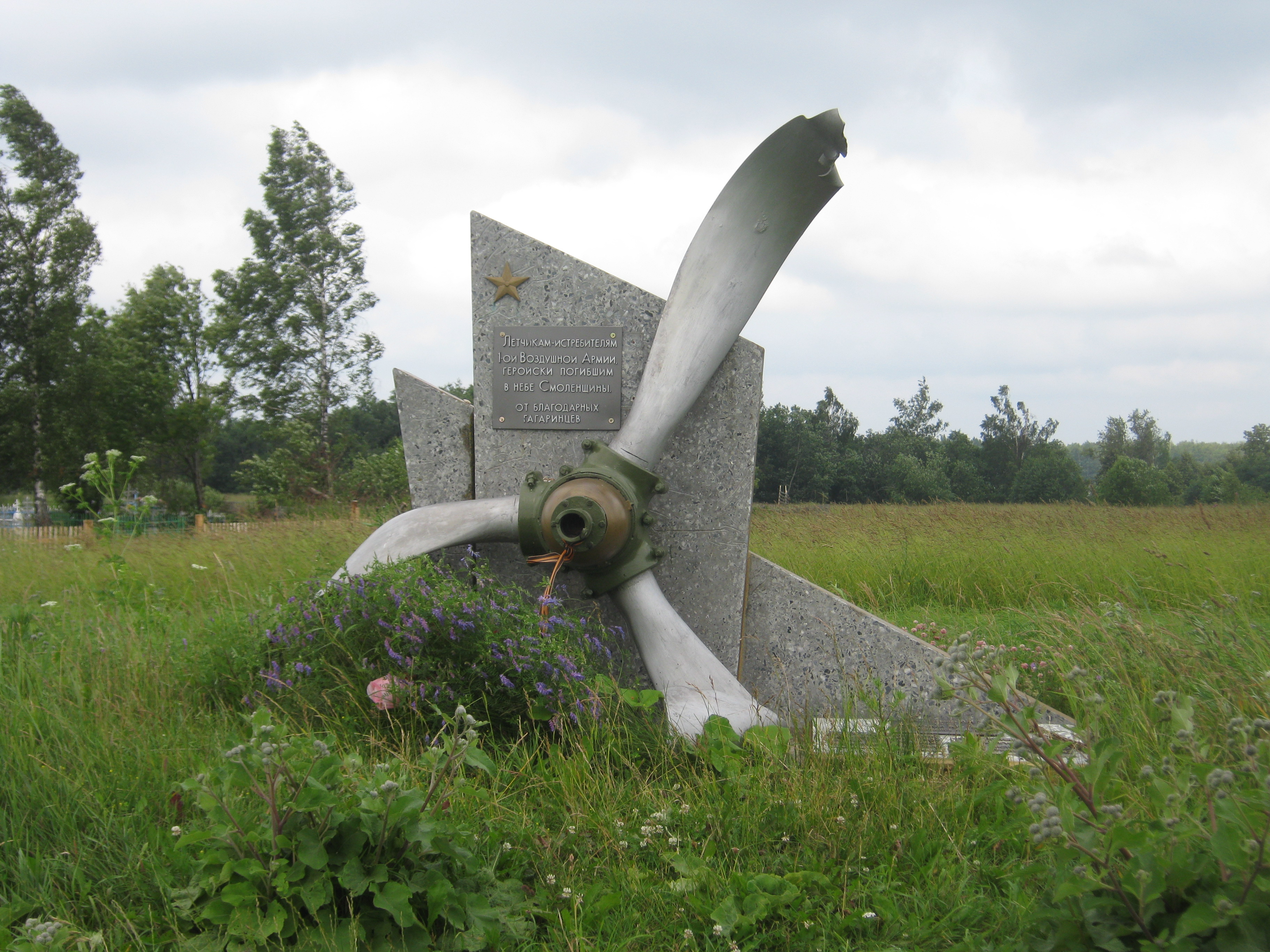 Памятник лётчикам, погибшим в боях на территории Гагаринского района Смоленской области в 1941-1942 годах. Расположен на кладбище деревни Барсуки.